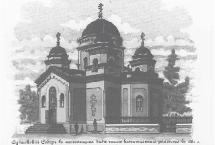 Беларуская (тарашкевіца): Сувалкі (Suvałki). Саборная царква